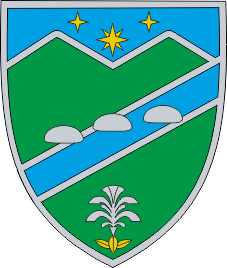 Герб Мукачівського району